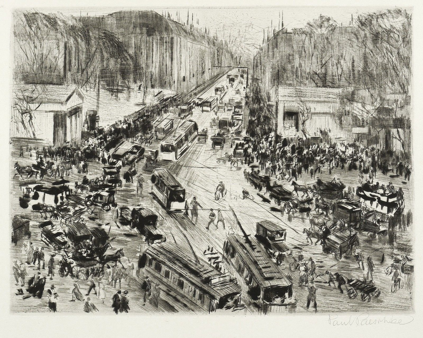 Paul Paeschke - Berlin. Potsdamer Platz mit Blick in die Leipziger Strasse, 1918. Radierung / Vernis mou, Roulette & Kaltnadel, auf weichem Kupferdruckpapier, 26,5 x 34,5 cm